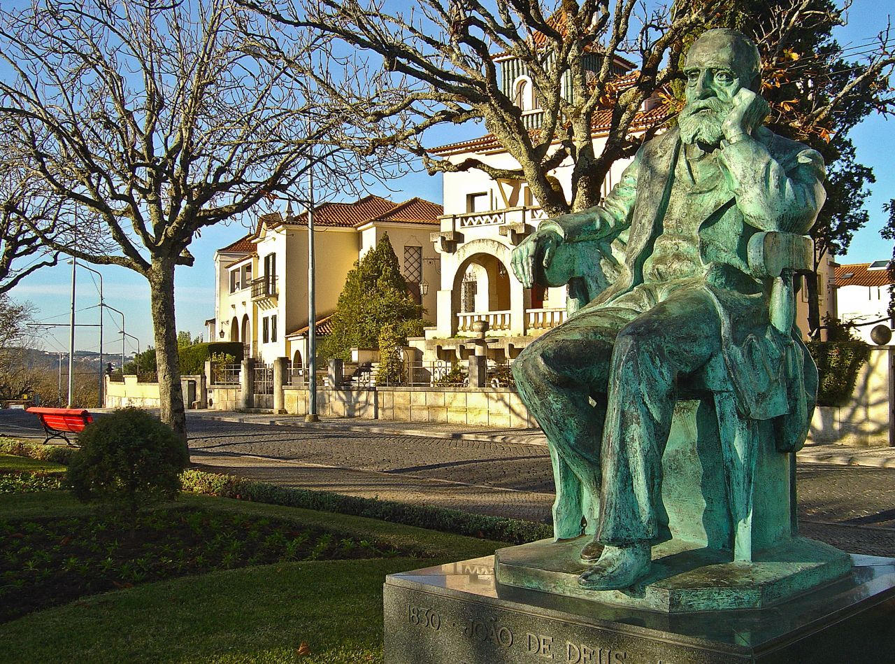 João de Deus de Nogueira Ramos (São Bartolomeu de Messines, 8 de Março de 1830 — Lisboa, 11 de Janeiro de 1896), mais conhecido por João de Deus, foi um eminente poeta lírico, considerado à época o primeiro do seu tempo, e o proponente de um método de ensino da leitura, assente numa Cartilha Maternal por ele escrita, que teve grande aceitação popular, sendo ainda utilizado. Gozou de extraordinária popularidade, foi quase um culto, sendo ainda em vida objecto das mais variadas homenagens e, aquando da sua morte, sepultado no Panteão Nacional. Foi considerado o poeta do amor. See where this picture was taken. [?]